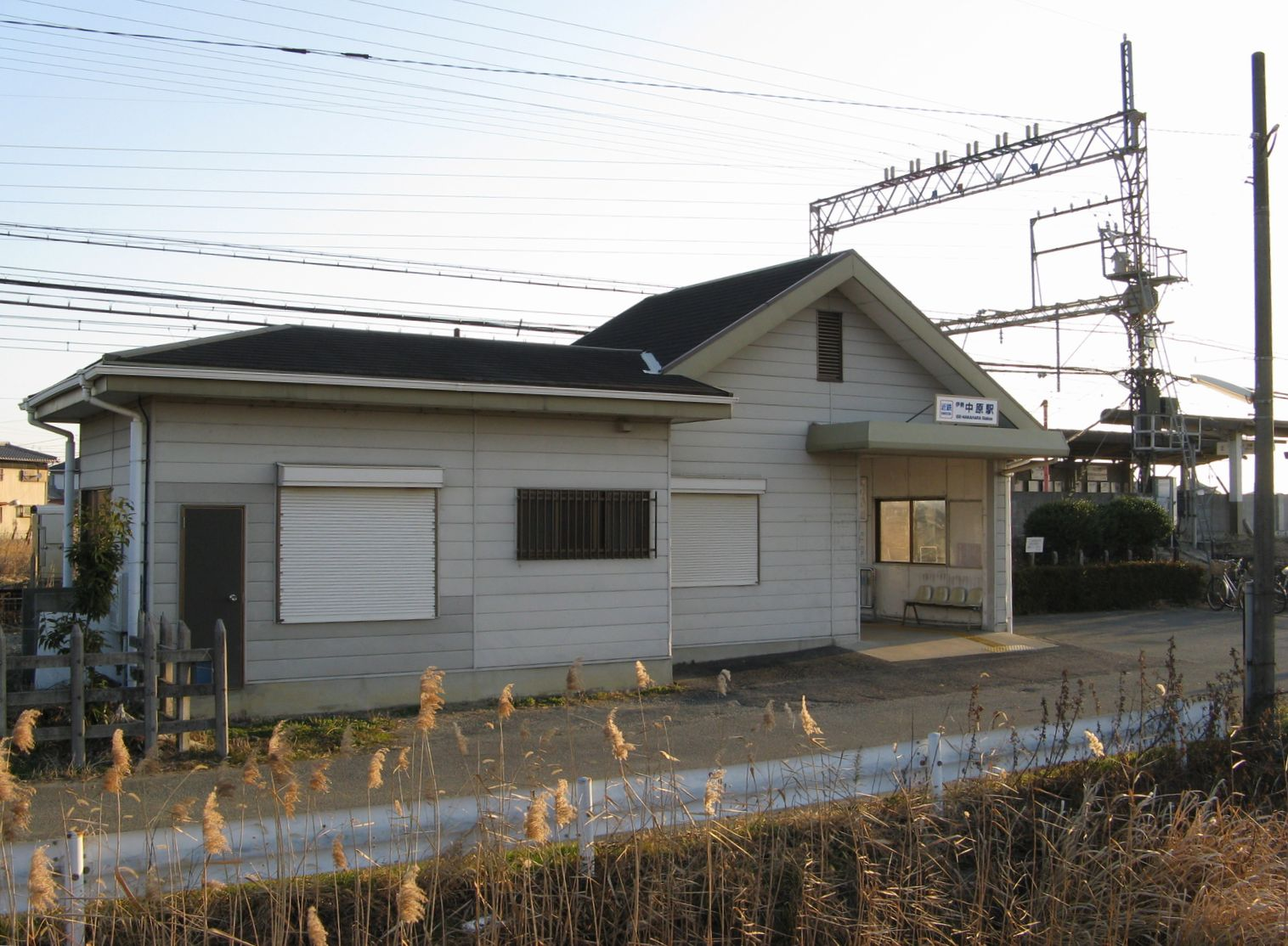 Ise-Nakahara Station, Matsusaka, Mie, Japan